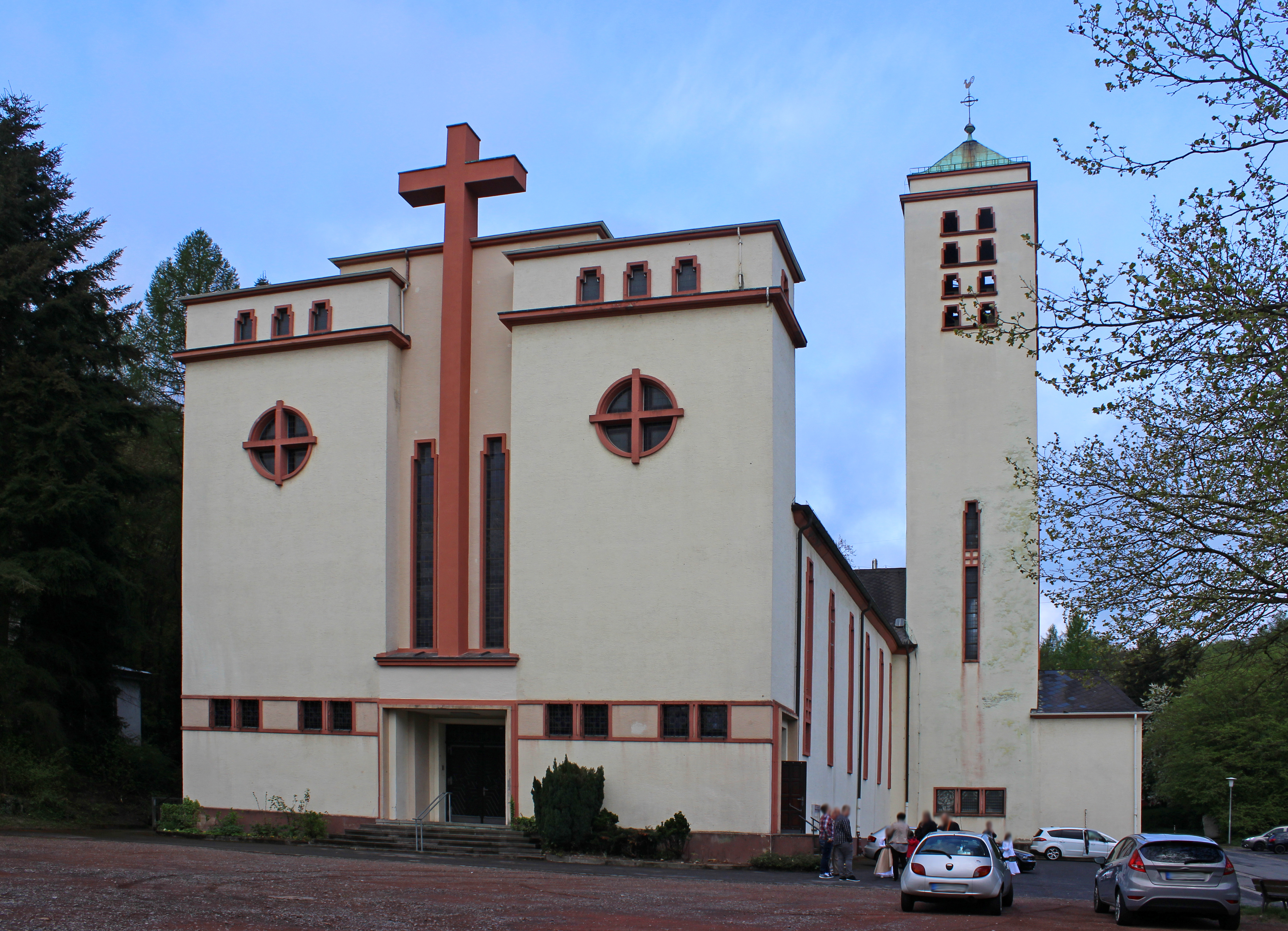 Die kath. St. Marien-Kirche in Saabrücken-Herrensohr.